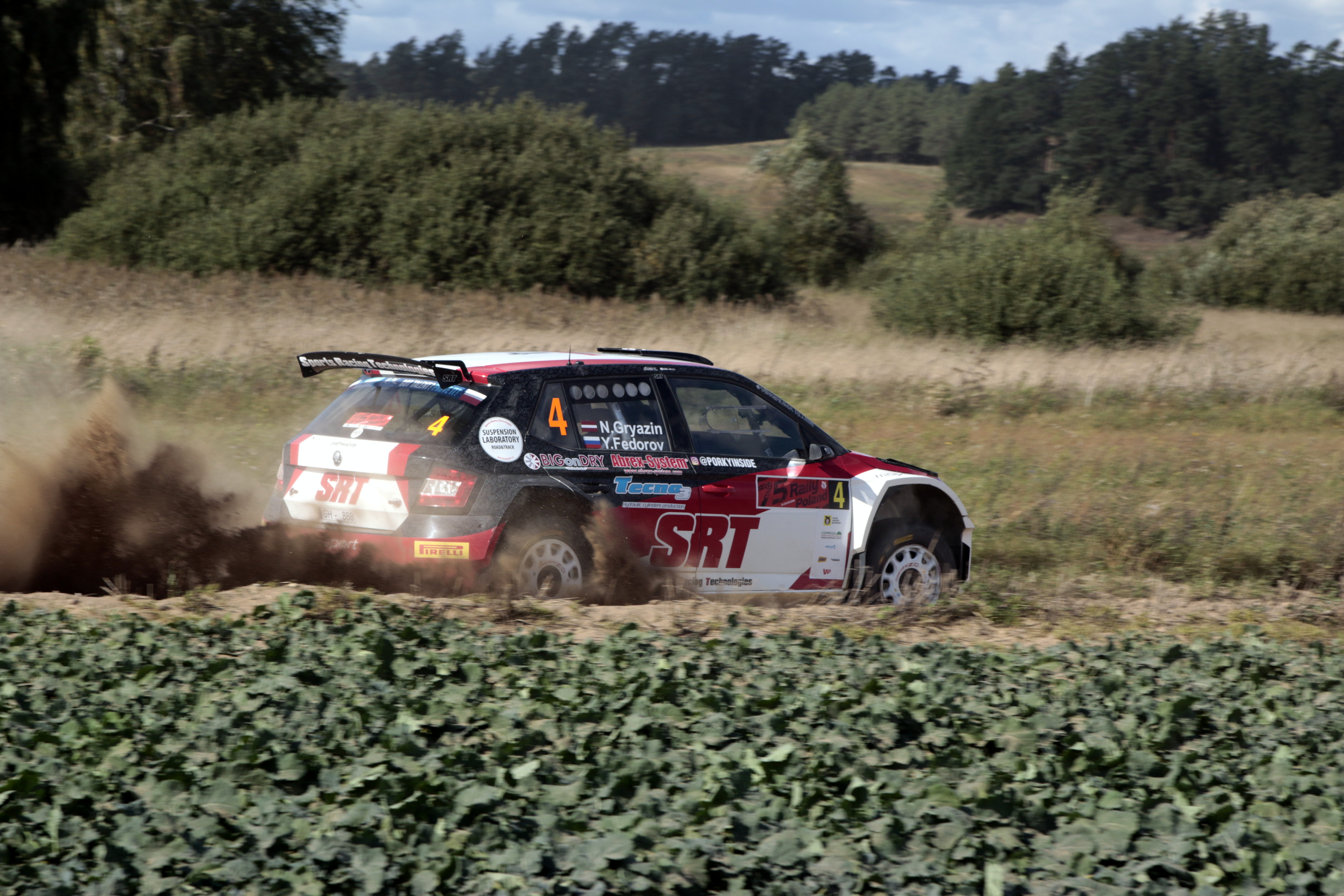 Rajd Polski - 2018 Nikolay Gryazin